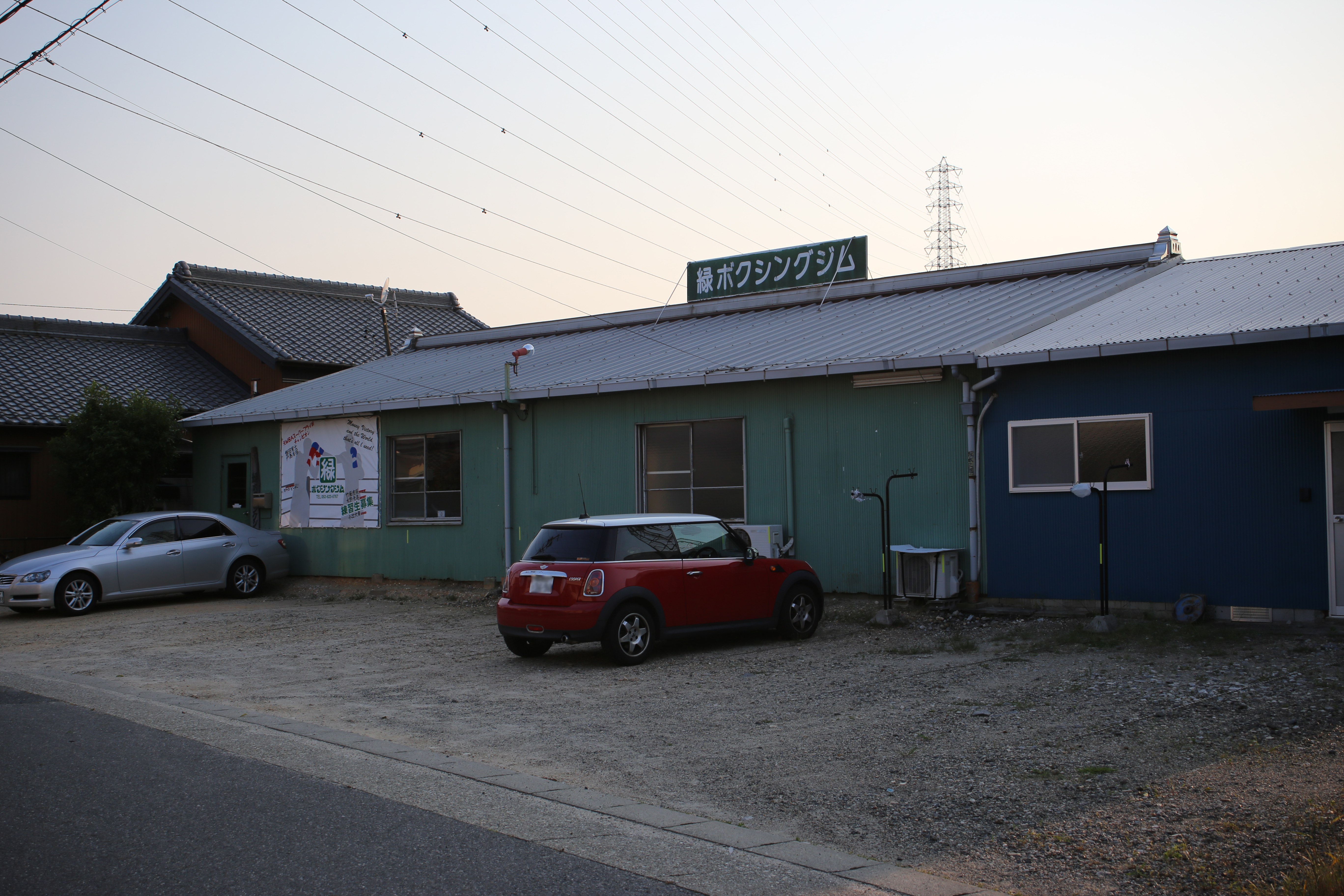 名古屋市緑区武路町の緑ボクシングジムを東側公道北側より撮影。ただし、ナンバープレートにつき画像処理済。